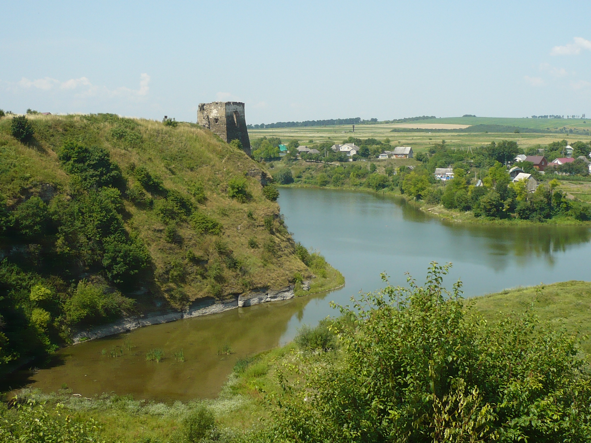 Zamek w Żwańcu